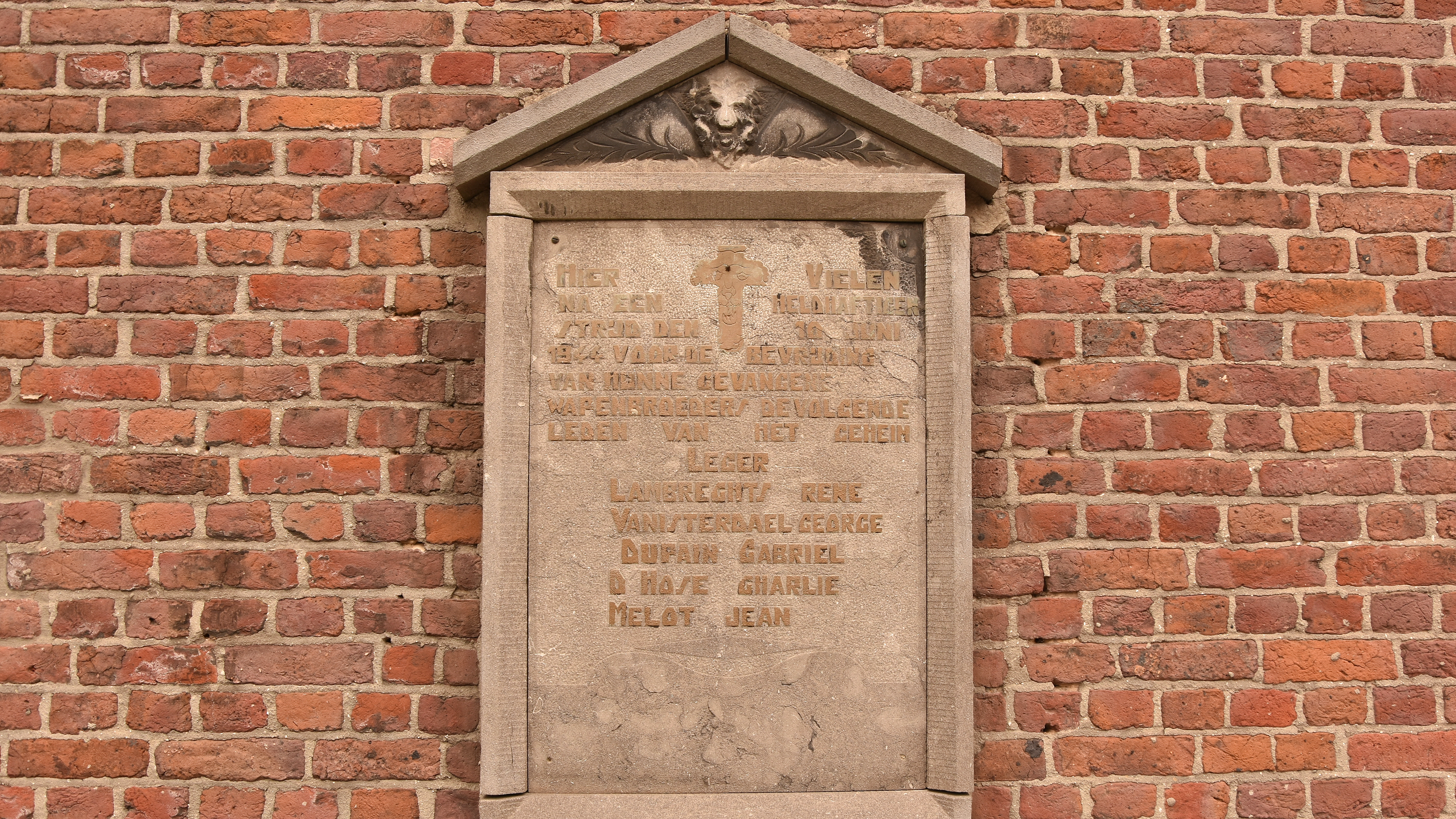 Gevangenis Hasselt - gedenkplaat voor gesneuvelde weerstanders 17-06-2018 16-35-51